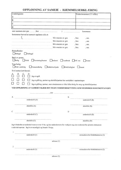 Skjema for oppløsing av sameie.